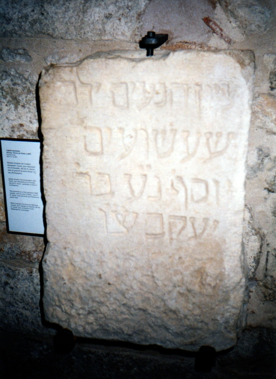 Tombstone of one Josef Bar Yaakov from Girona he:הרך והנעים ילד שעשועים יוסף נ"ע (נוחו עדן) בר (בן רבי) יעקב יצ"ו (ישמרהו צוּרוֹ ויחיהו)